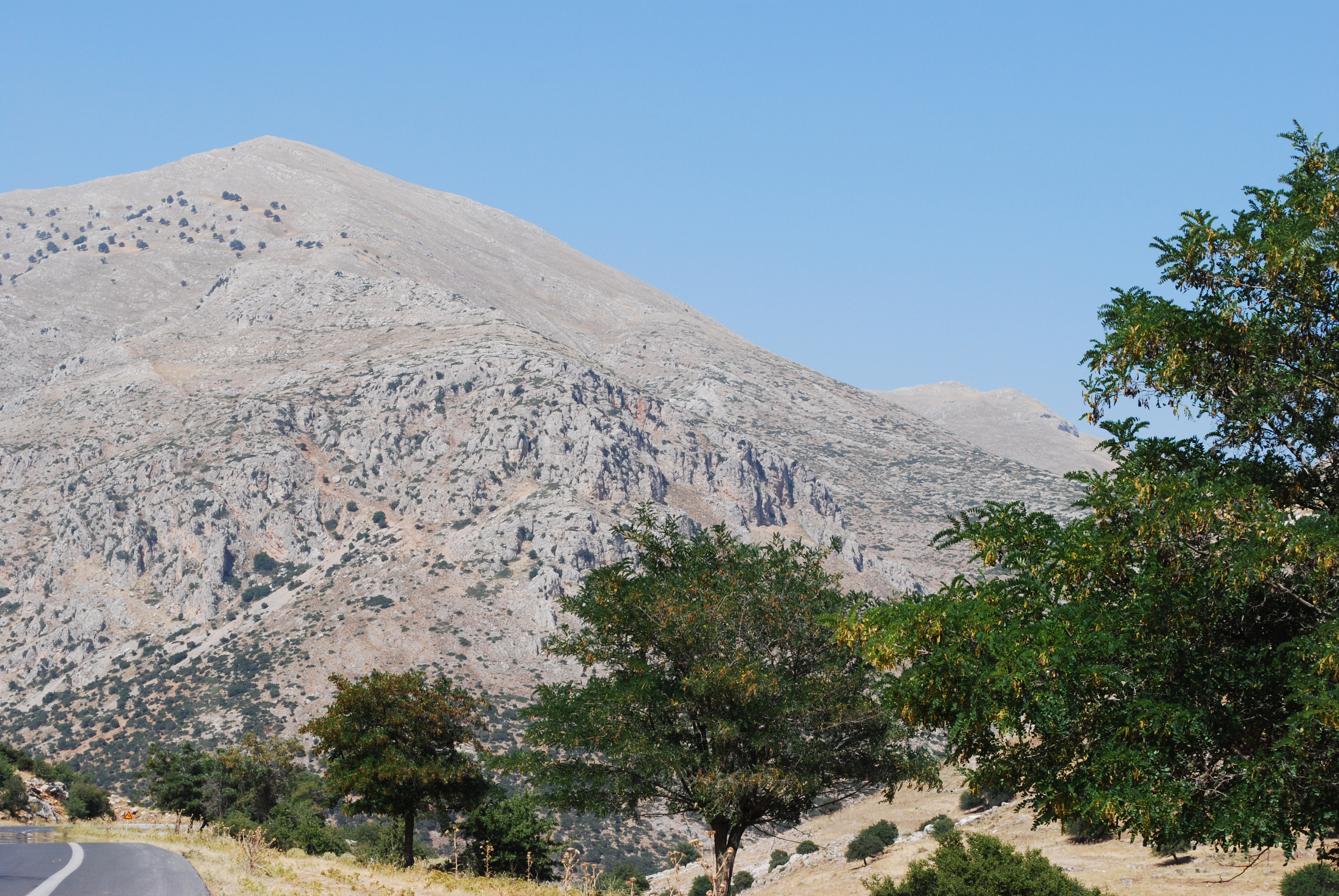 Vue des montagnes dans les environs d'Achladokampos, dans le Péloponnèse.